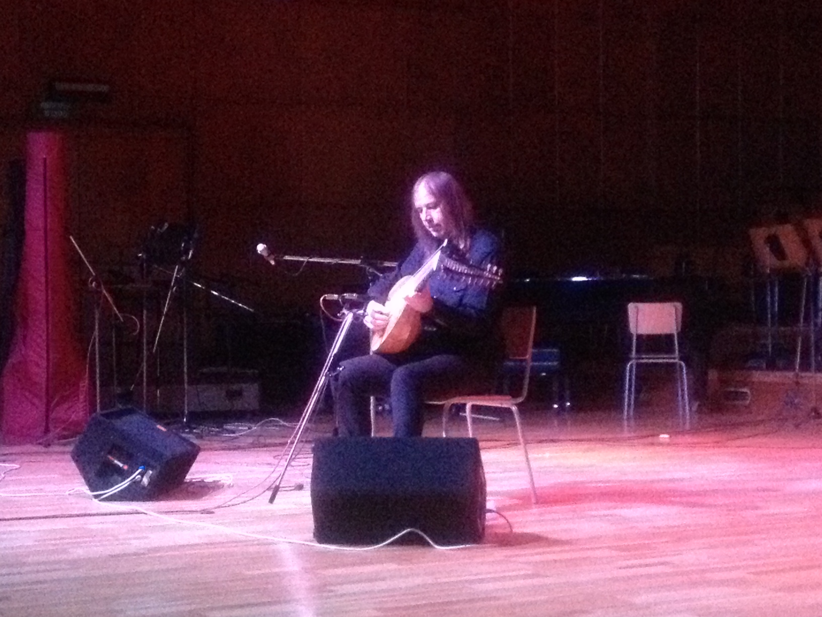 Йозеф ван Висем концерт в София, Студио 1 на БНР, 22 март 2016 г